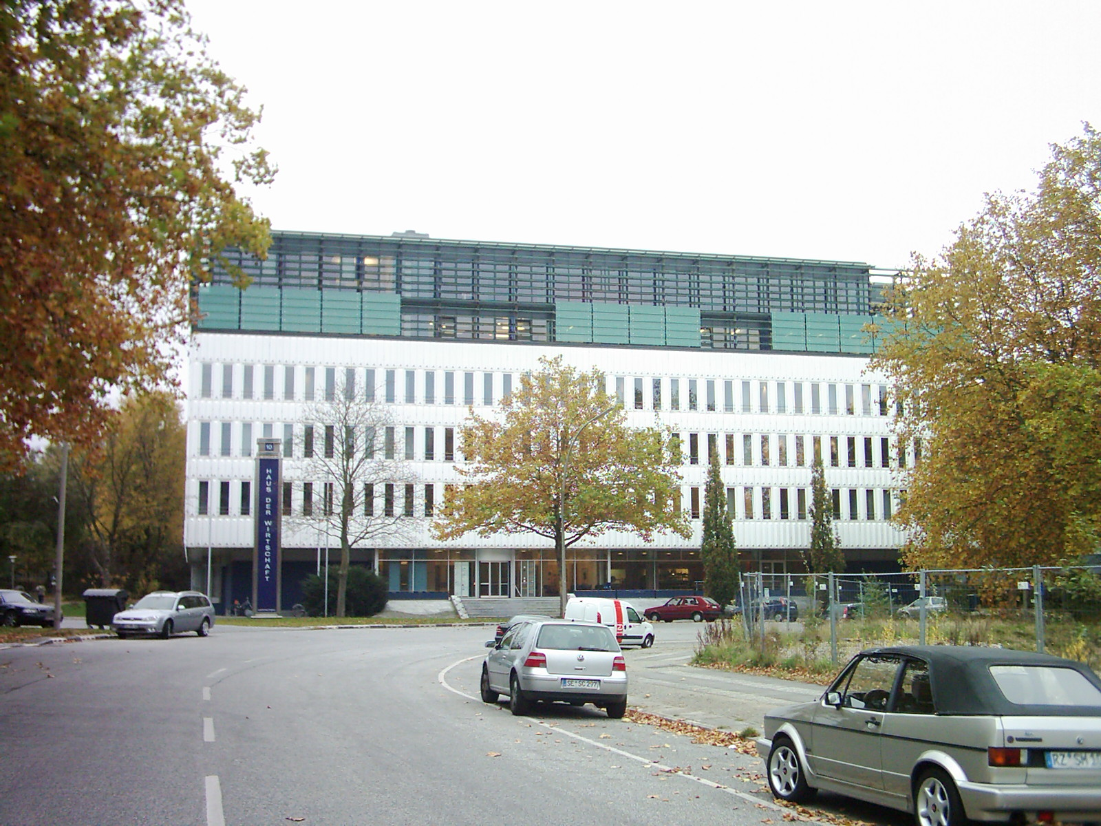 Haus der Wirtschaft, Kapstadtring, City Nord, Hamburg.